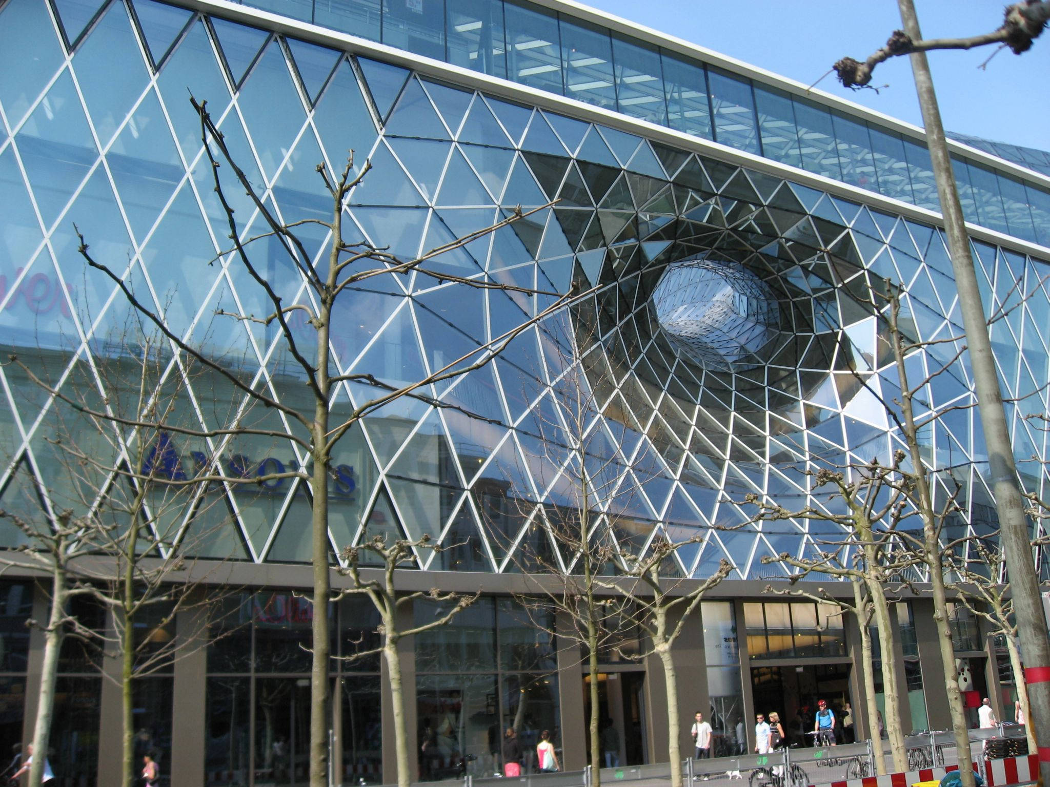 MyZeil Fassade